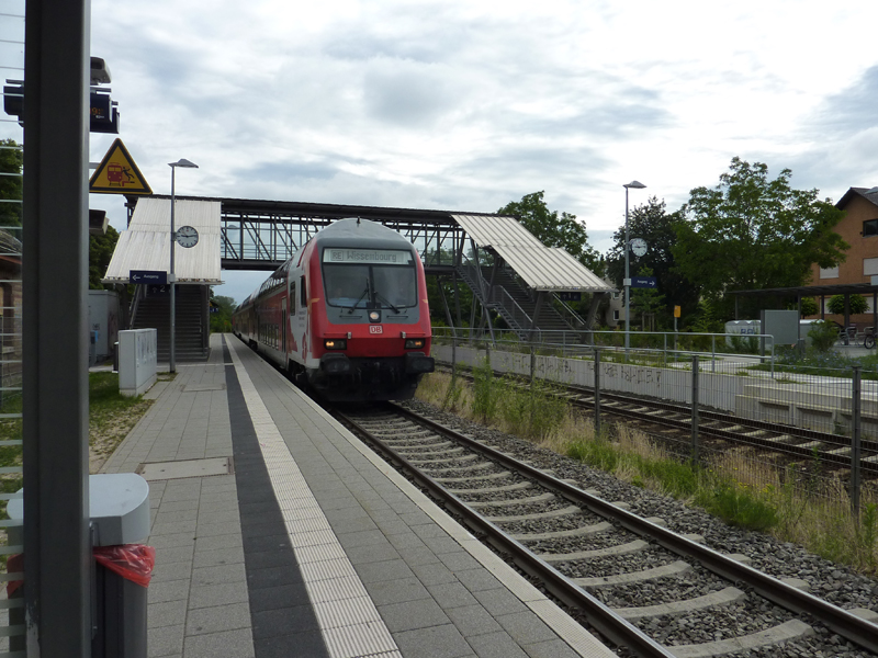 Elsass-Express von Mainz nach Wissembourg, hier einfahrt in den Bahnhof Saulheim